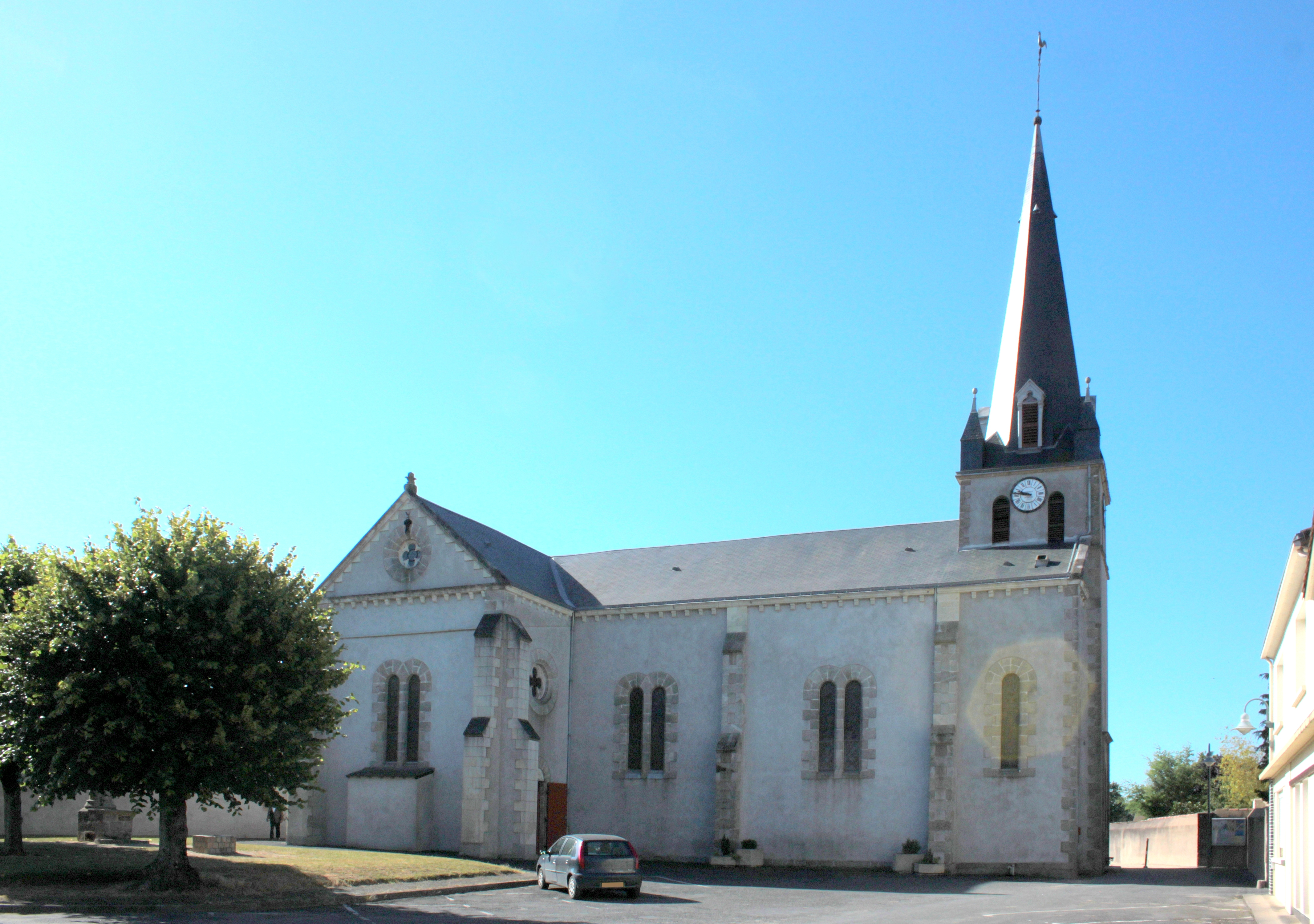 Église Notre-Dame de l'Assomption (1861), Fr-85-Boufféré.